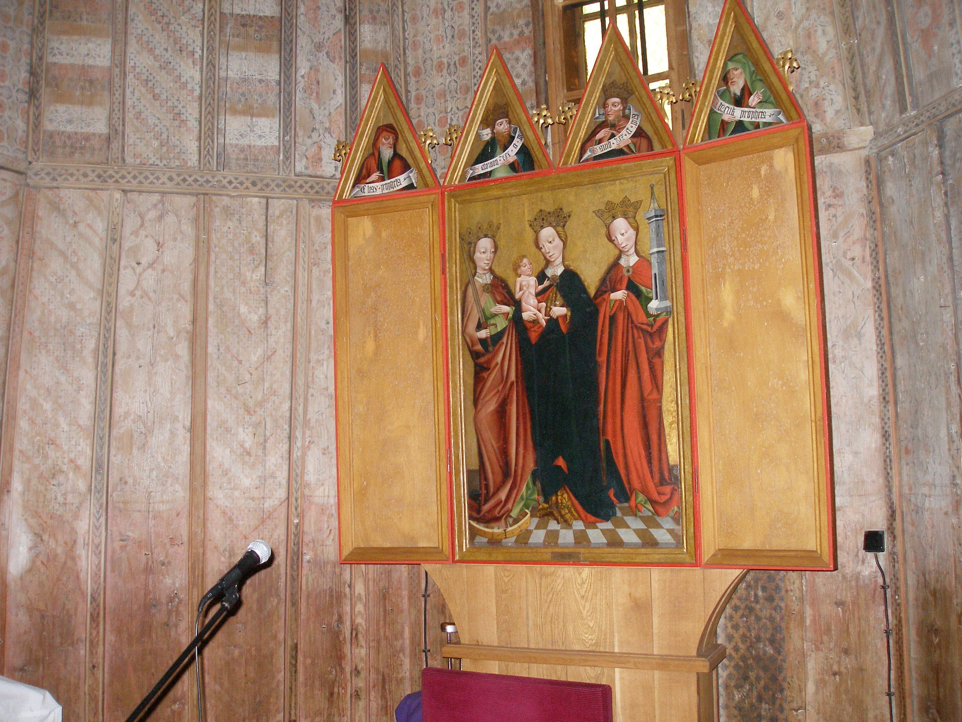 Obec Hervartov okres Bardejov. Kostol svätého Františka z Assisi.